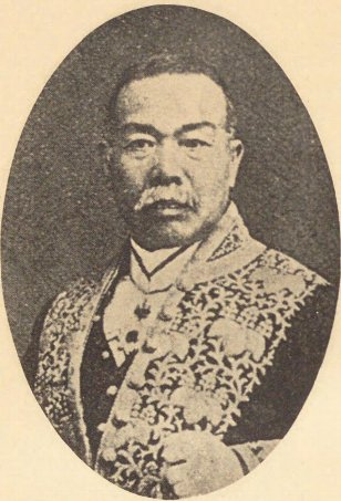 調所広丈（1840-1911）